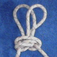 Noeud de papillon alpin